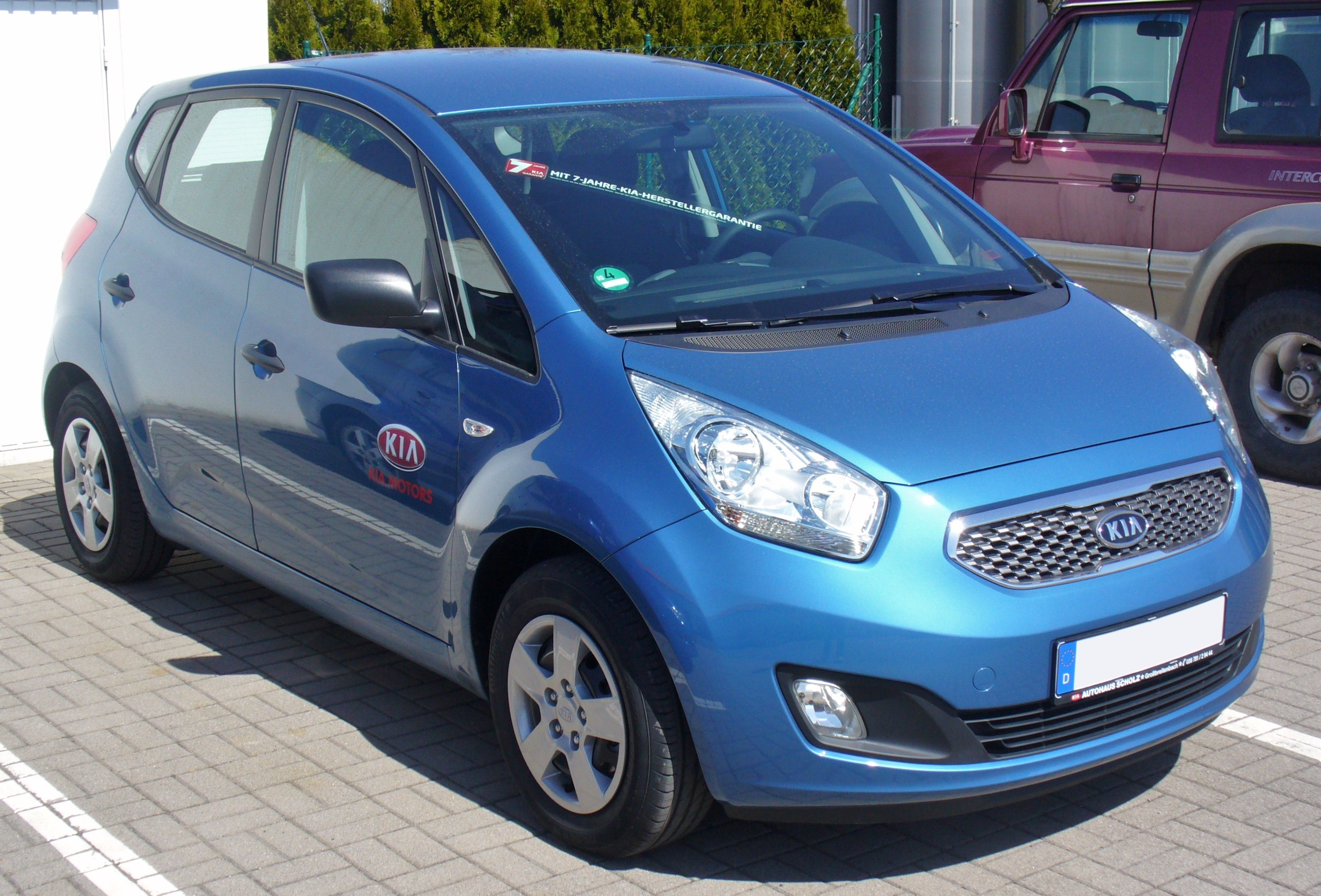 Kia Venga